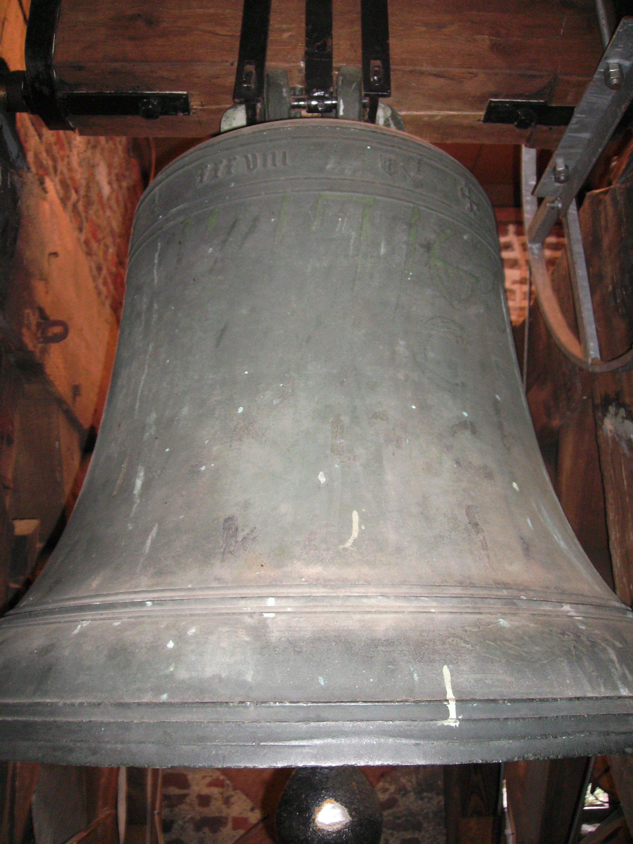 Marienglocke ( 1438 gegosssen) im Turm der Alten Kirche Kellen